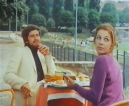 Da sinistra: Gianni Morandi e Stefania Casini in una sequenza del film del 1970 Le castagne sono buone diretto da Pietro Germi. Licensing 1970 1970